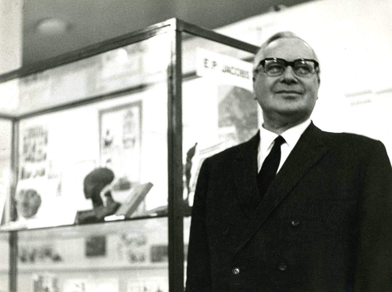 Pierre Gilbert lors de l’ouverture de l’exposition « Le Monde de la Bande dessinée » aux MRAH, le 20 juin1969. Edgar Pierre Jacobs, le créateur de « Blake et Mortimer », dont on voit le nom sur la vitrine, au-dessus de l’épaule de Pierre Gilbert, prit à cette occasion cette photo, qu’il lui a offerte et dédicacée.